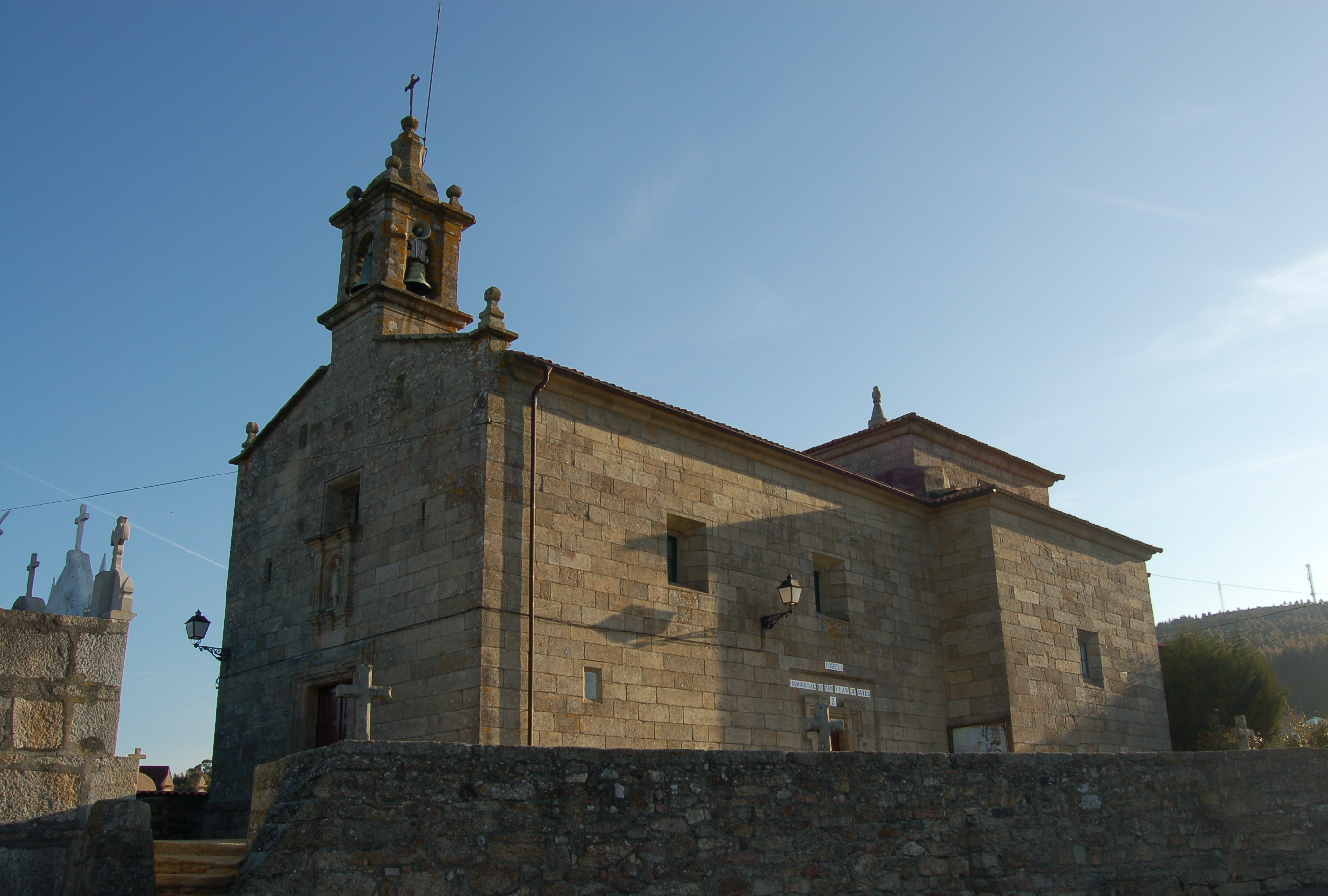 Igrexa parroquial de Artes (Ribeira).